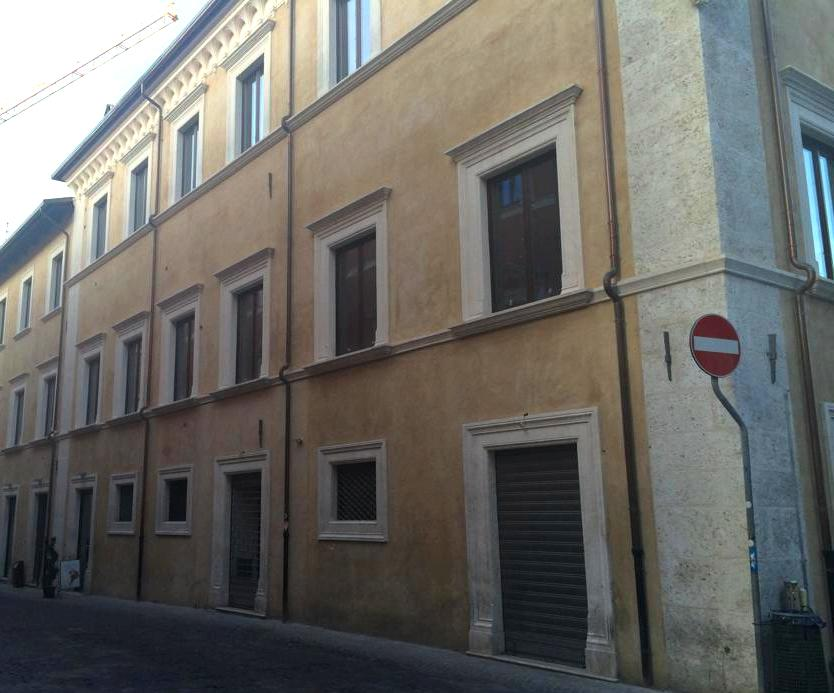 Palazzo Lucentini Bonanni, in L'Aquila, dopo il restauro (2015)